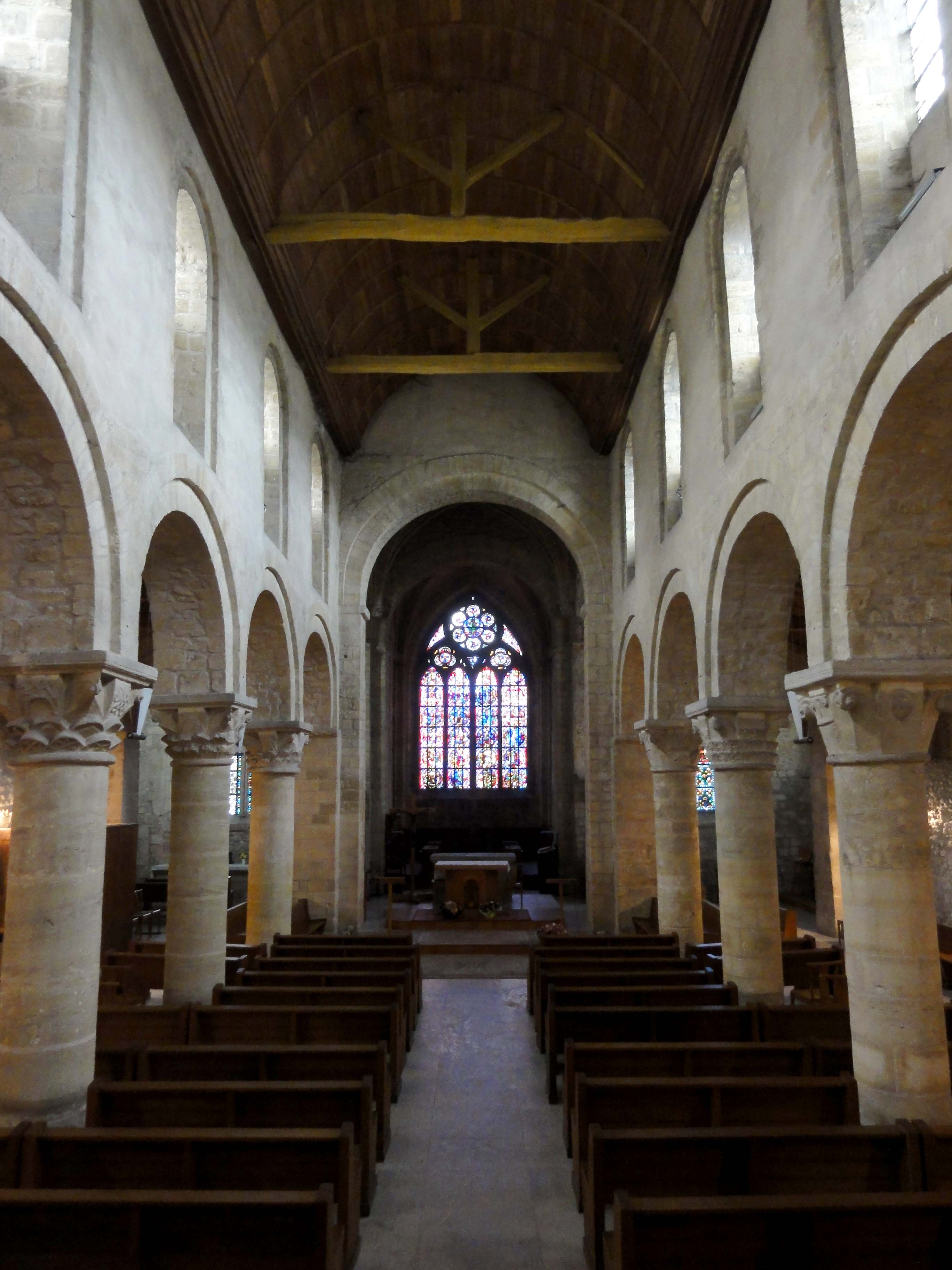 Intérieur de l'église - voir titre.